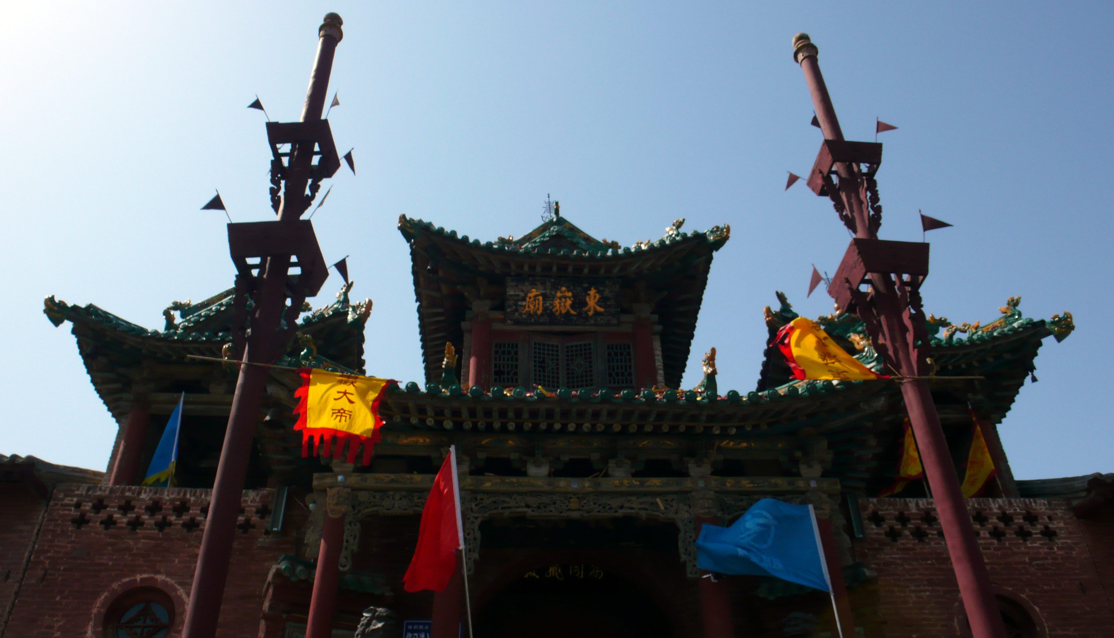 中文（中国大陆）: 柏山东岳庙山门。